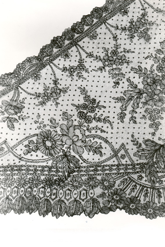 MoMu Collection S67/89. Driehoekige sjaal in Chantilly kloskant met bloemtuilen en rozenranken in netslag op tulemaas. Go to and type in the MoMu collection number to find more information about the object.